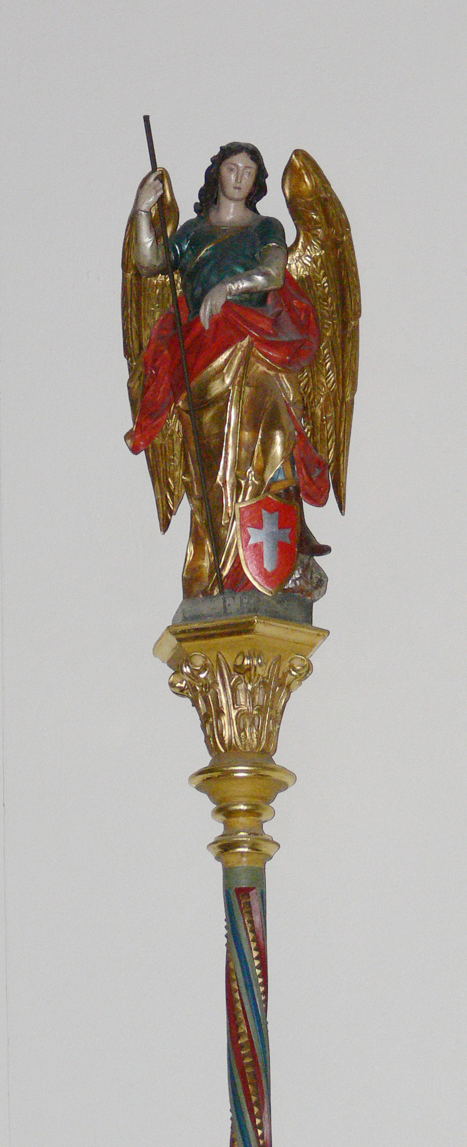 Pfarrkirche St. Michael, Aichstetten, Landkreis Ravensburg, Baden-Württemberg Prozessionsstange St. Michael